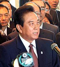 Chen Yunlin 陈云林